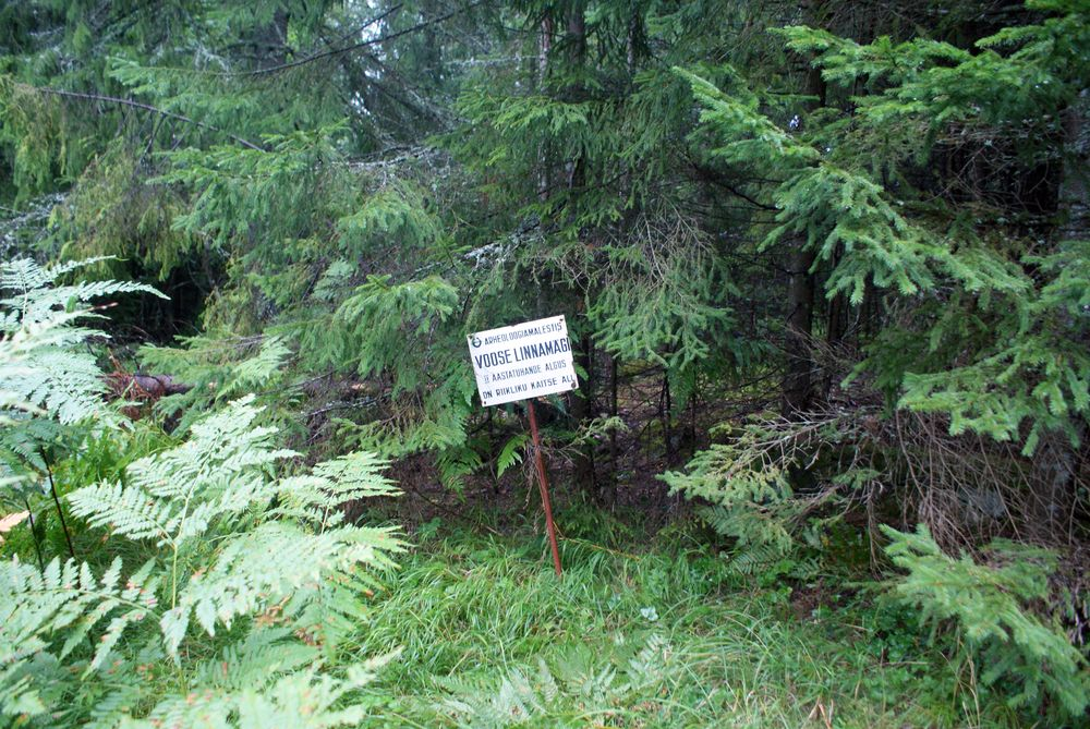 Linnus "Voose linnamägi"